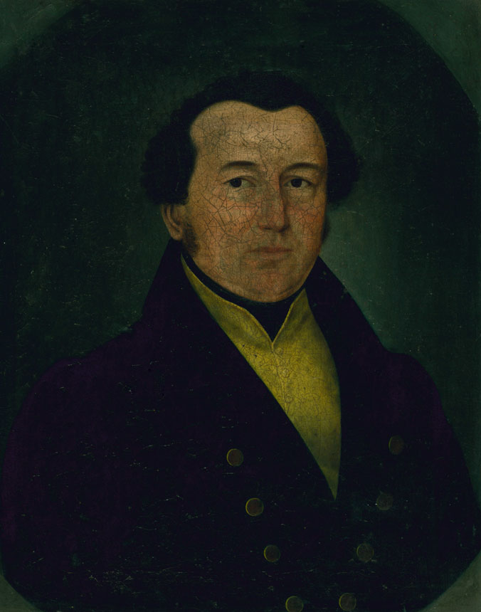 Porträt von Carl Anton Wunsch (* 17. April 1790 in Heiligenstadt; † 7. Juli 1853 in Heiligenstadt), aus Familienbesitz, Künstler unbekannt